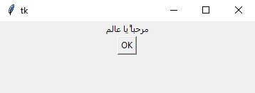 صورة واجهة رسومية